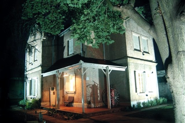 Museo Histórico Municipal, Junín, provincia de Buenos Aires, Argentina.